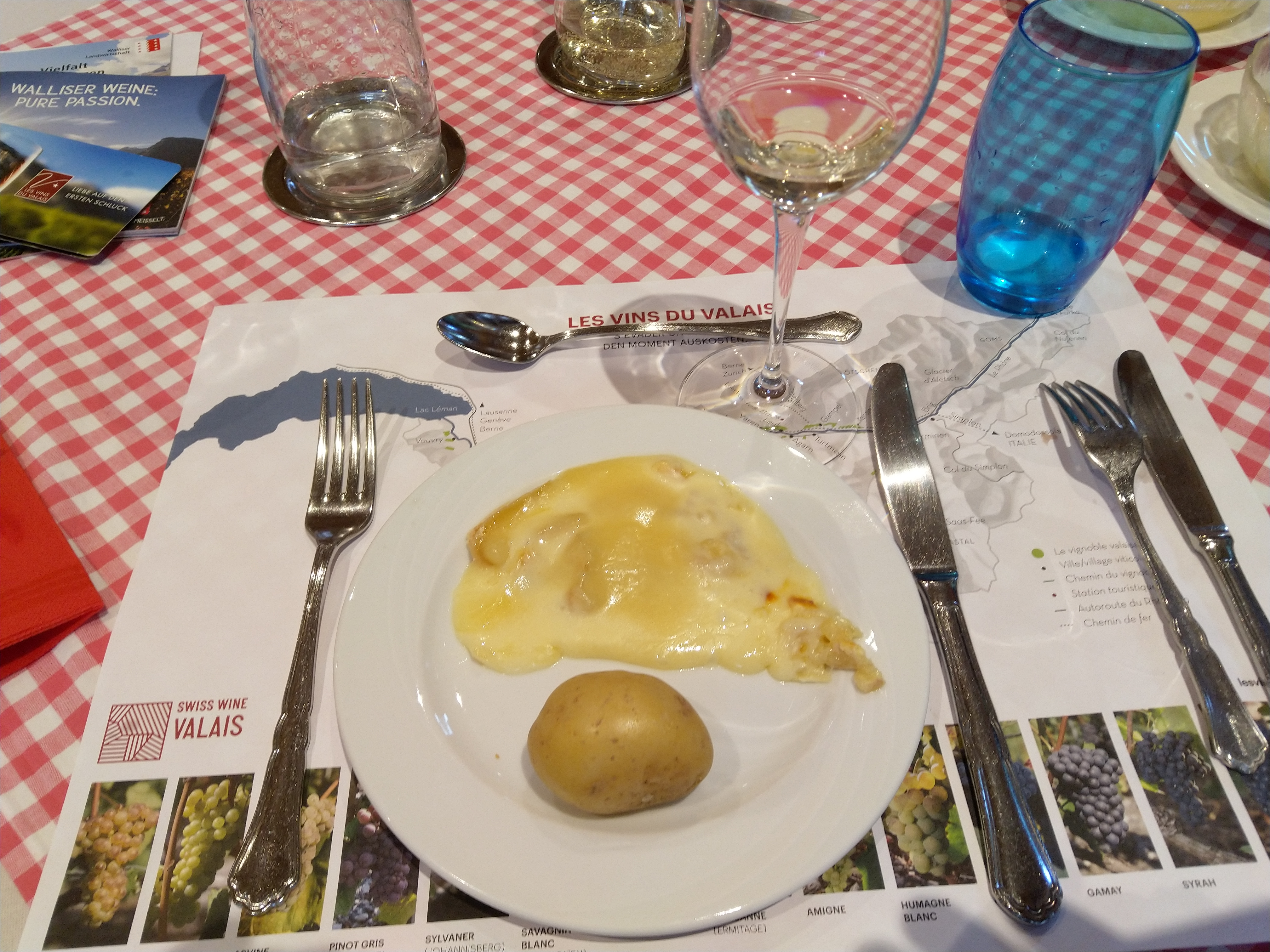 Walliser Raclette-Portion mit einem Glas Johannisberg, dem Sylvaner des Wallis